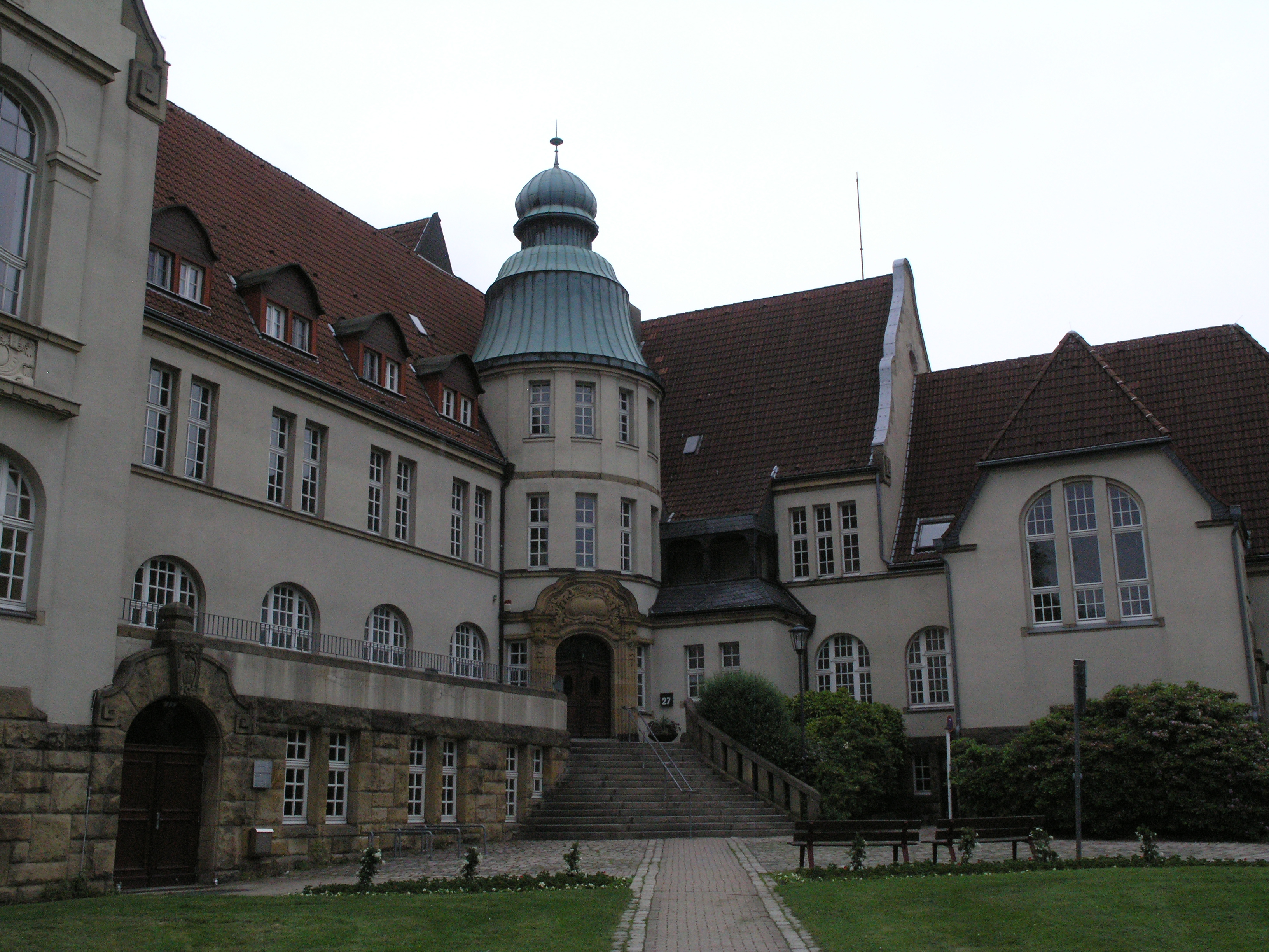 Северный Рейн - Вестфалия, Эссен – ратуша района Край